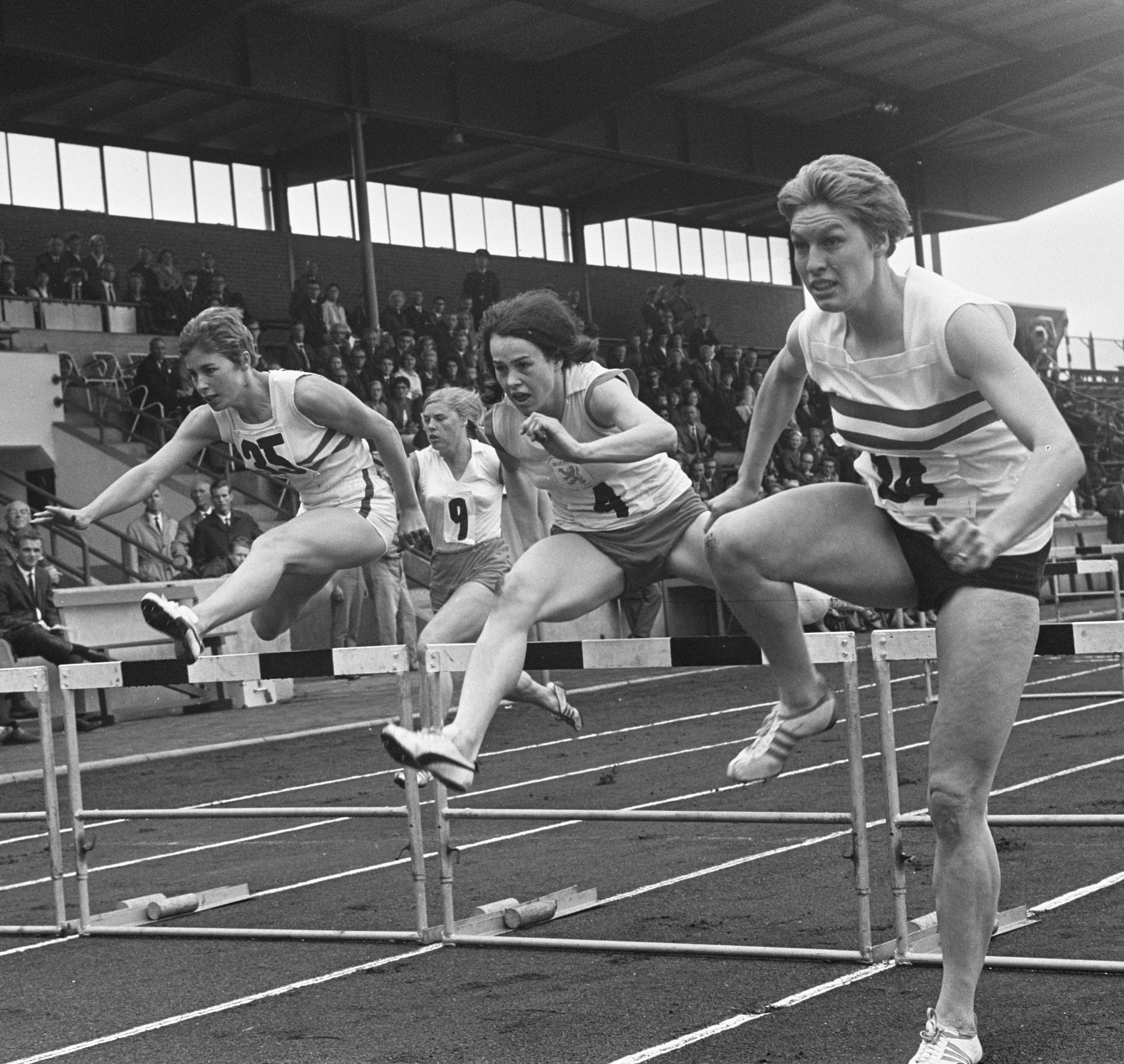 Atletiek Nederland tegen Engeland dames in Enschede, 80 meter horden v.l.n.r. Mary Rand (E), Lia Hinten en Pat Pryce